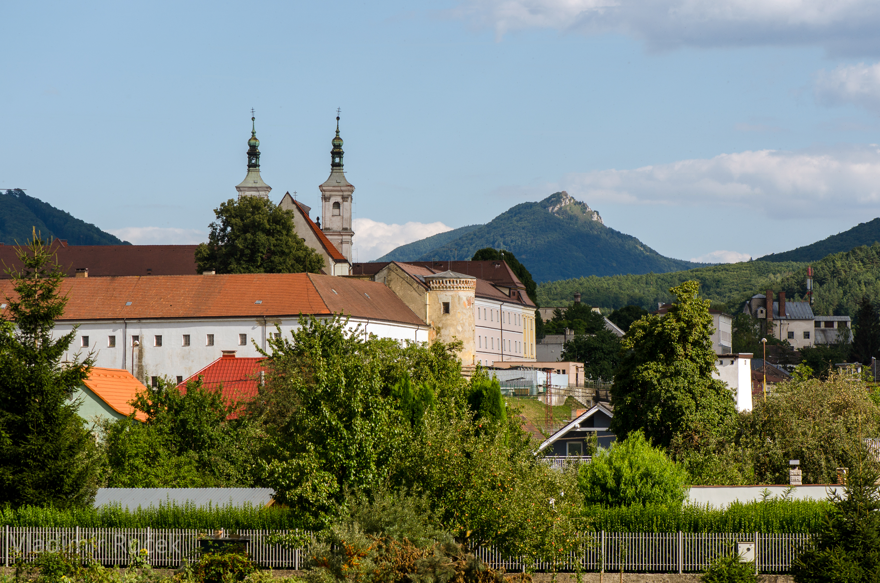 Ilavský hrad, Farský kostol, trinitársky